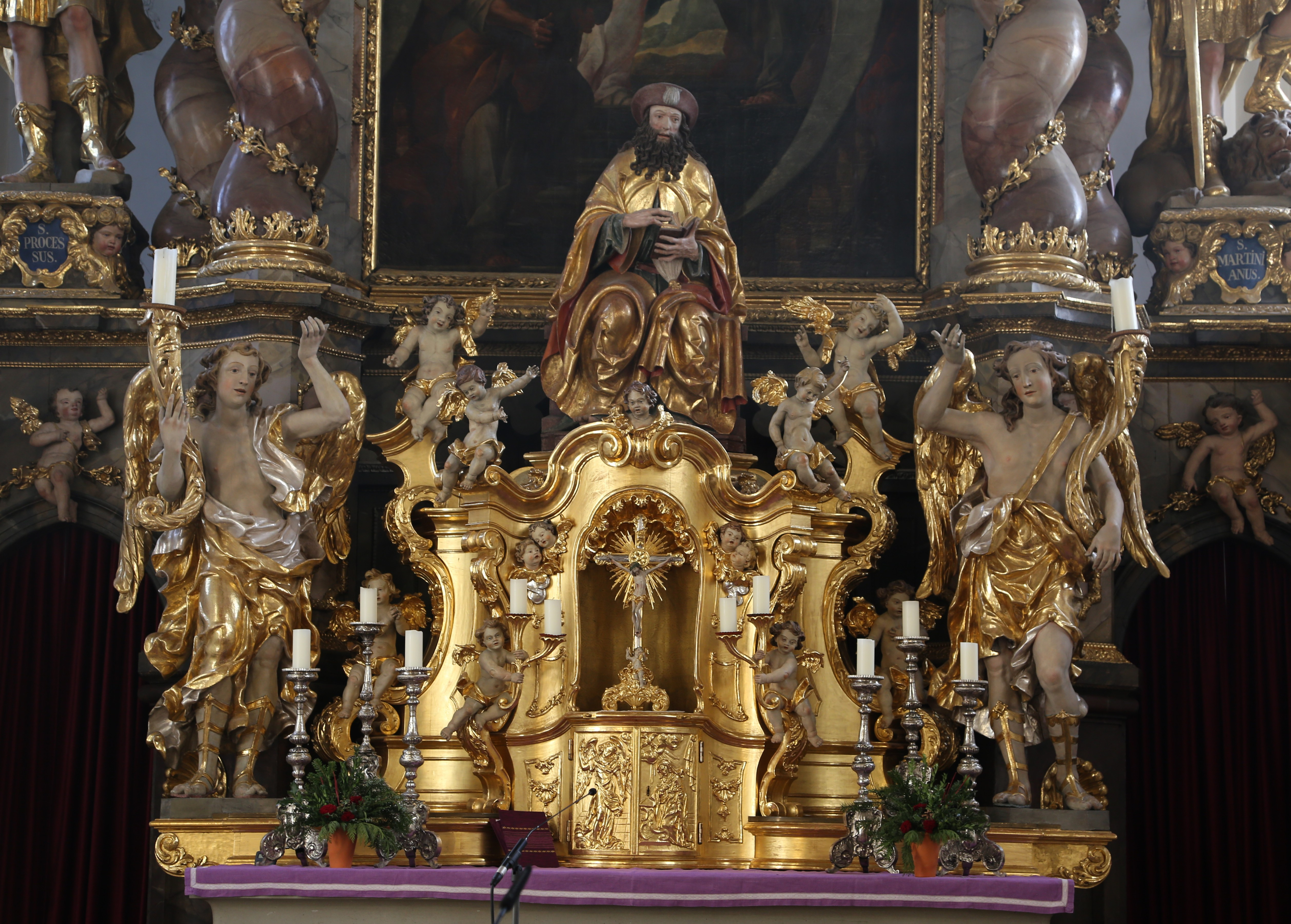 St.-Jakobus-Platz 1, Rohrdorf; Kath. Pfarrkirche St. Jakobus d.Ä., Saalbau mit Satteldach und Nordturm mit Spitzhelm, Turmunterteil spätgotisch, barocker Neubau 1769-73 von Leonhard Matthäus Gießl, 1854-55 Turmoberbau, 1864 neuromanische Vorhalle; mit Ausstattung; Friedhofsummauerung des 17./18. Jh.